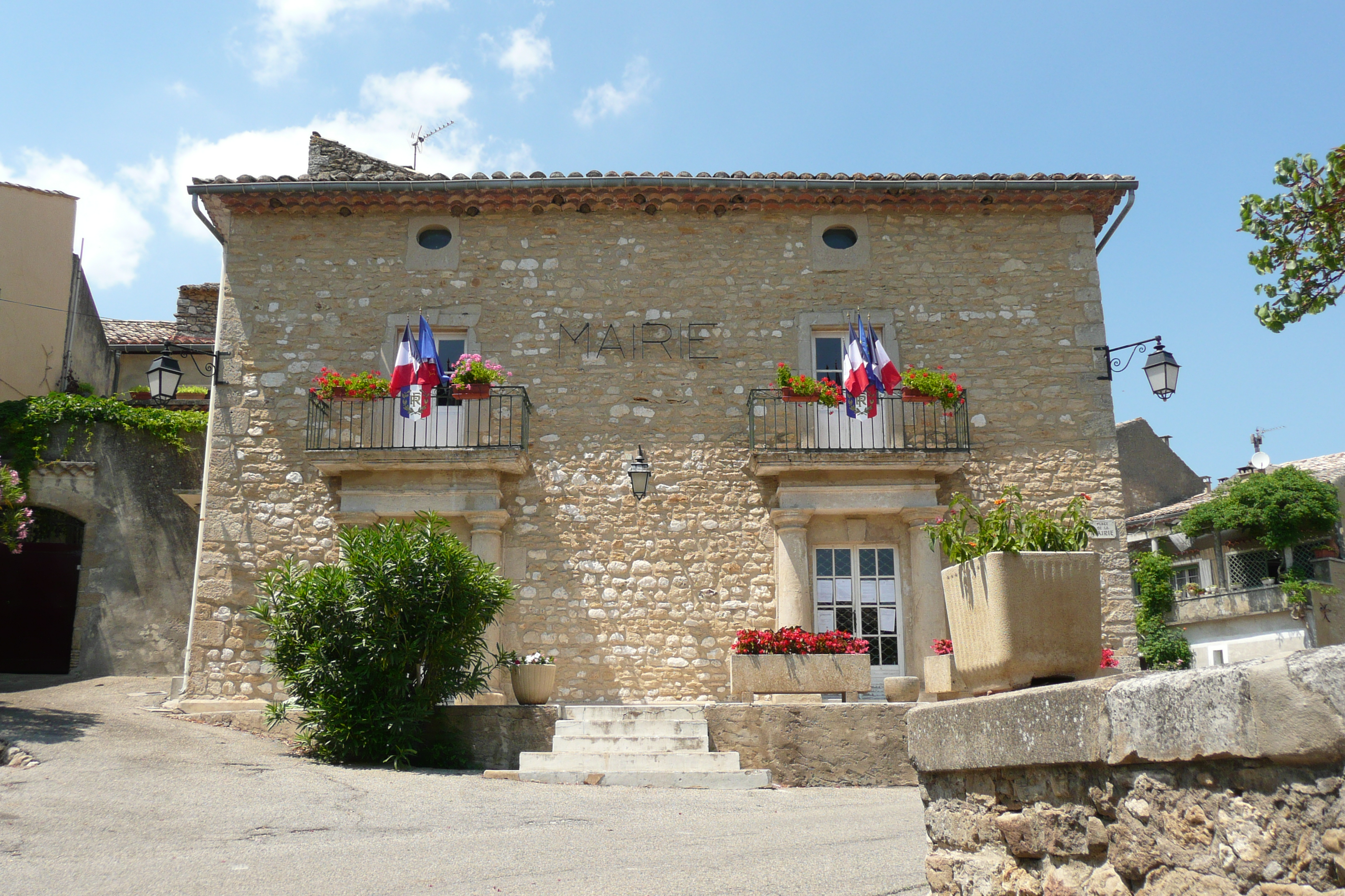 Mairie à Saint-André-de-Roquepertuis.